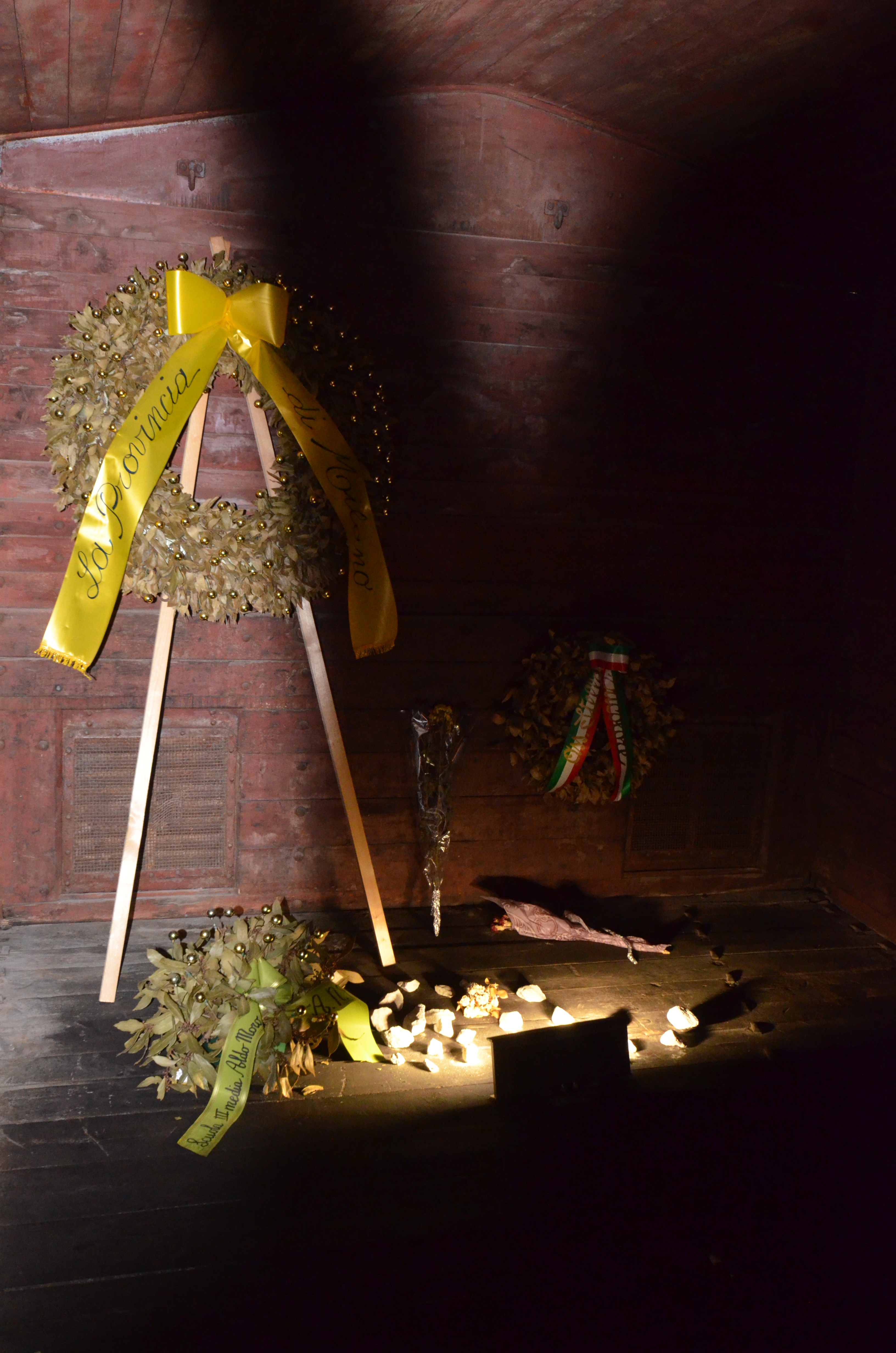 פרחים בשביל הנופלים